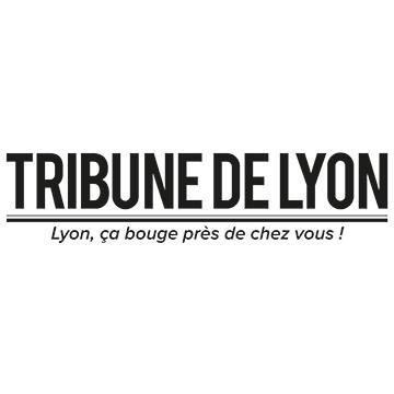 Logo actuel de Tribune de Lyon